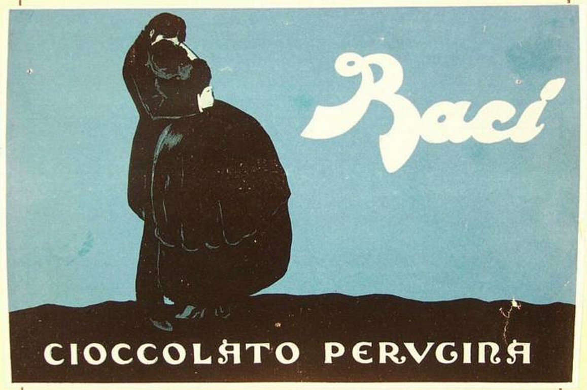 Marchio dei baci cioccolato Perugina (ACS, Ministero dell'Industria Commercio e Artigianato, Ufficio Italiano Brevetti e Marchi, Serie Marchi, fasc. 26022, 1923)